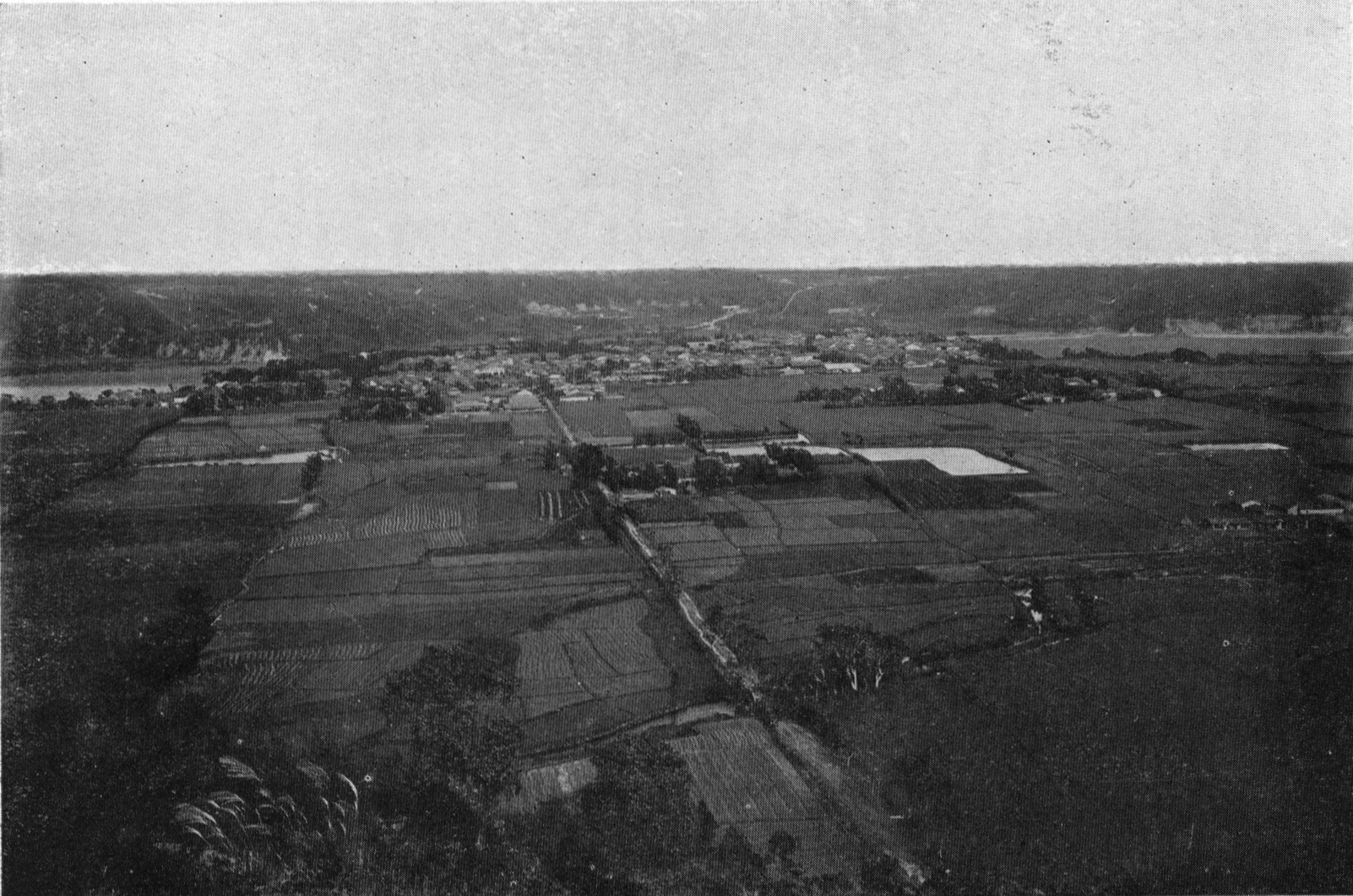 中文（台灣）: 圖中為淡水河右岸(今大漢溪)，於大溪街東方的河階上往大溪眺望的景色，從古至今都將此地稱作大嵙崁。